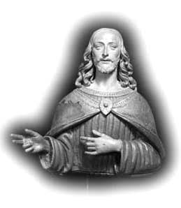 Agnolo di Polo, Busto del Salvatore, 1498. Museo Civico, Pistoia